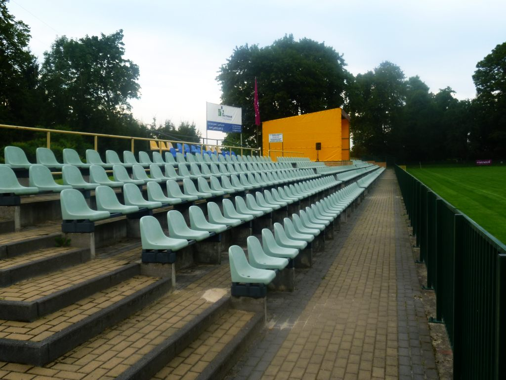 Stadion KS Pardayż Wielka Wola 14